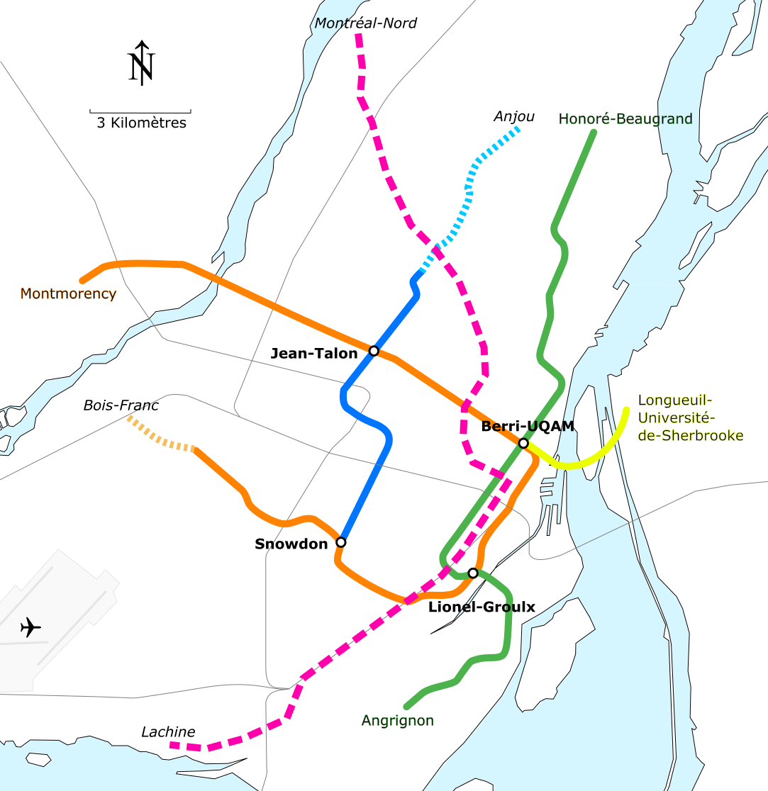 Carte géographiquement exacte des lignes du métro de Montréal, de ses extensions prévues et de la ligne rose étudiée. Sont aussi représentées les lignes de trains de banlieue.